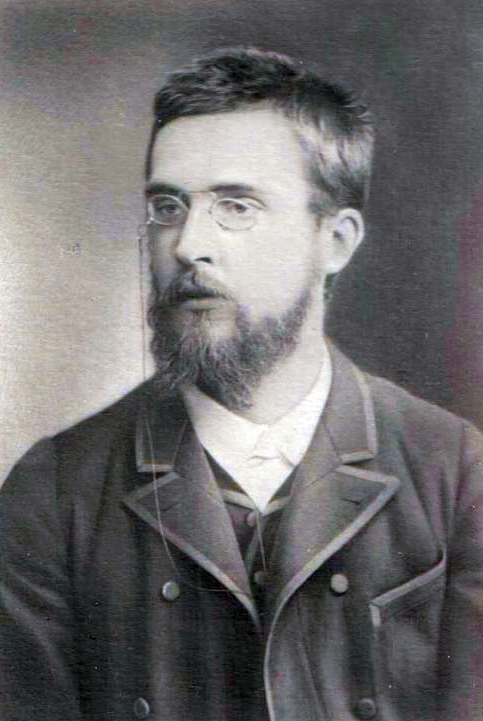 Никола́й Фёдорович Гамале́я (1859—1949) — российский и советский врач, микробиолог и эпидемиолог, почётный член АН СССР (с 1940), академик АМН СССР (1945).